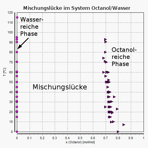 Temperaturabhängiges LLE im nicht-mischbaren binären System Octanol/Wasser